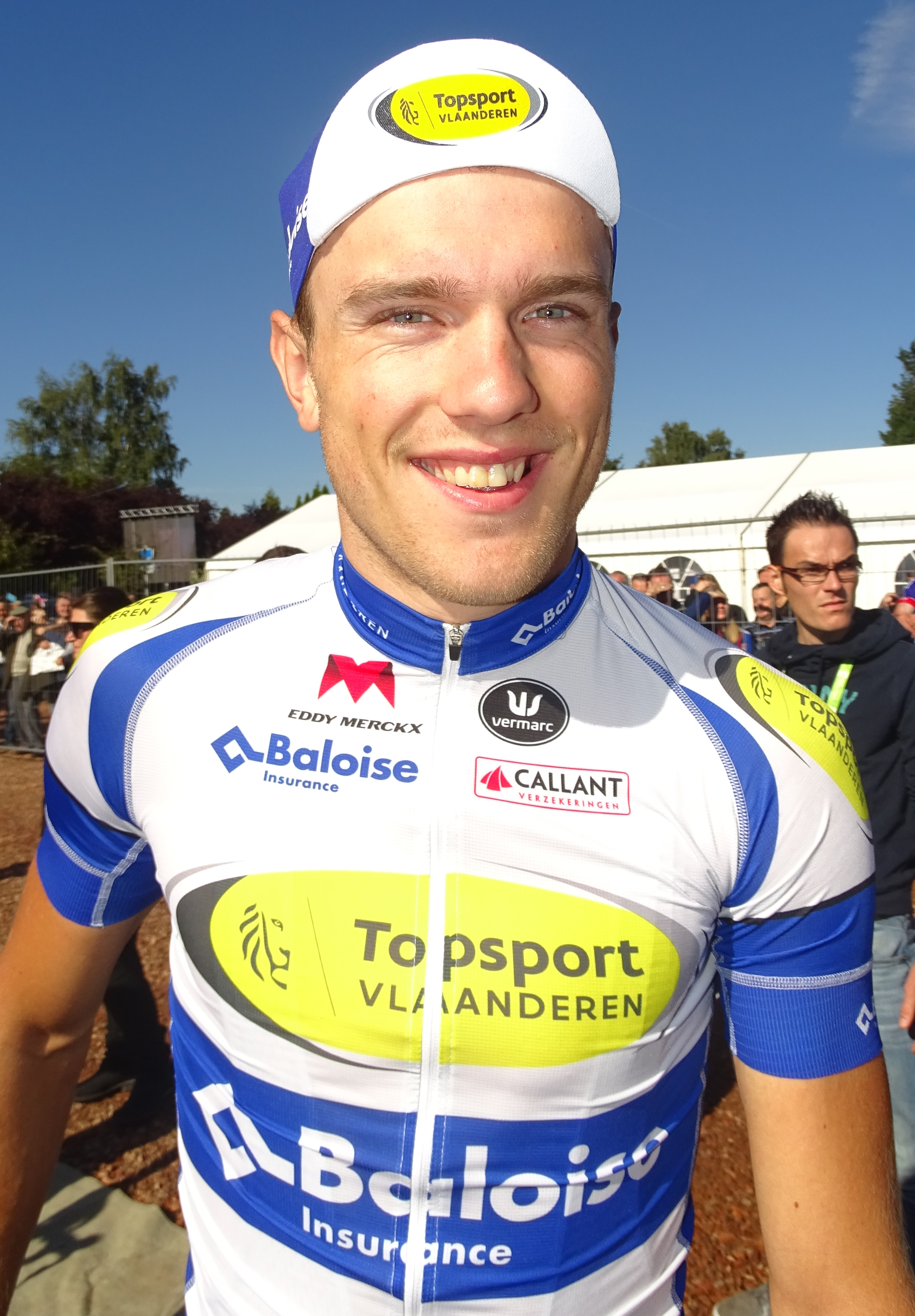 Reportage réalisé le dimanche 20 septembre à l'occasion du départ et de l'arrivée du Grand Prix d'Isbergues 2015 à Isbergues, Nord-Pas-de-Calais, France.